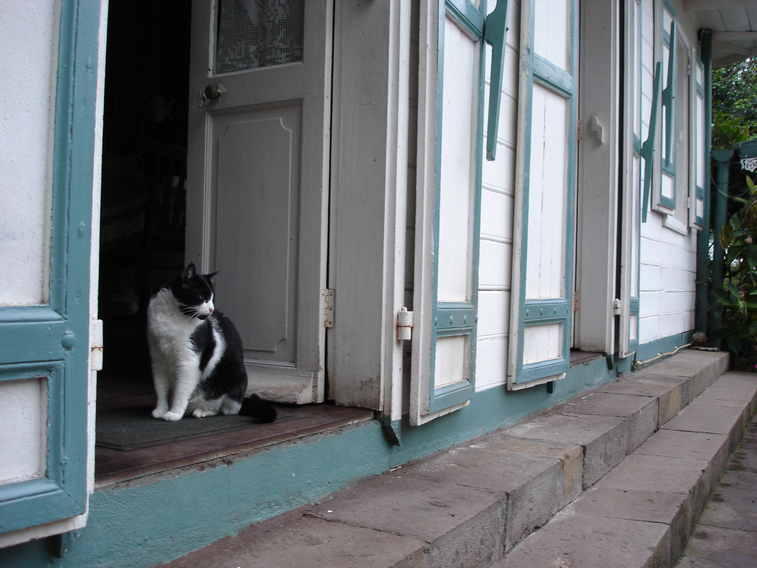 Description: Villa Folio, novembre 2004, La Réunion Source: Bouba